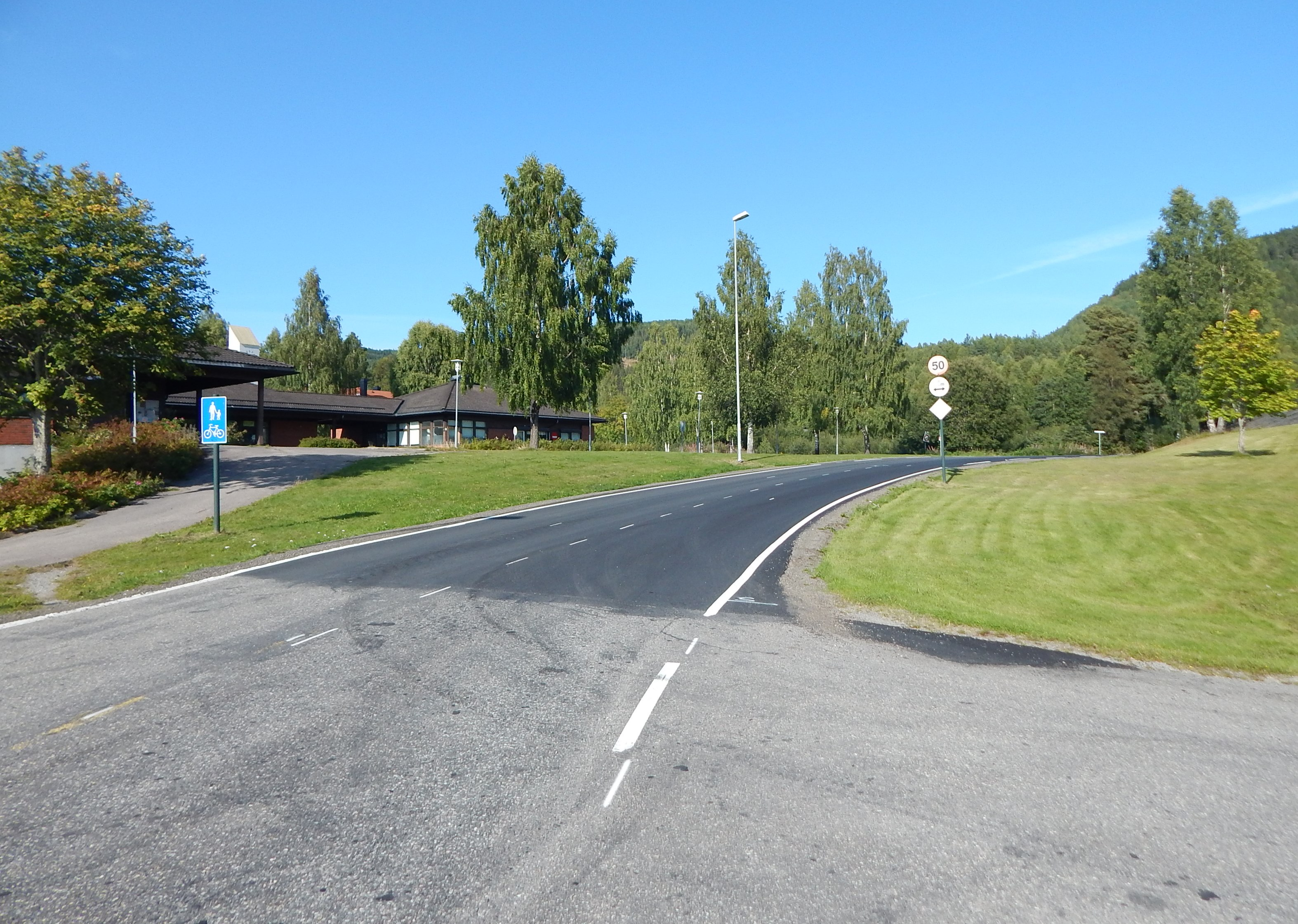 Minneåsvegen (fylkesvei 554) ved Torget i Hurdal